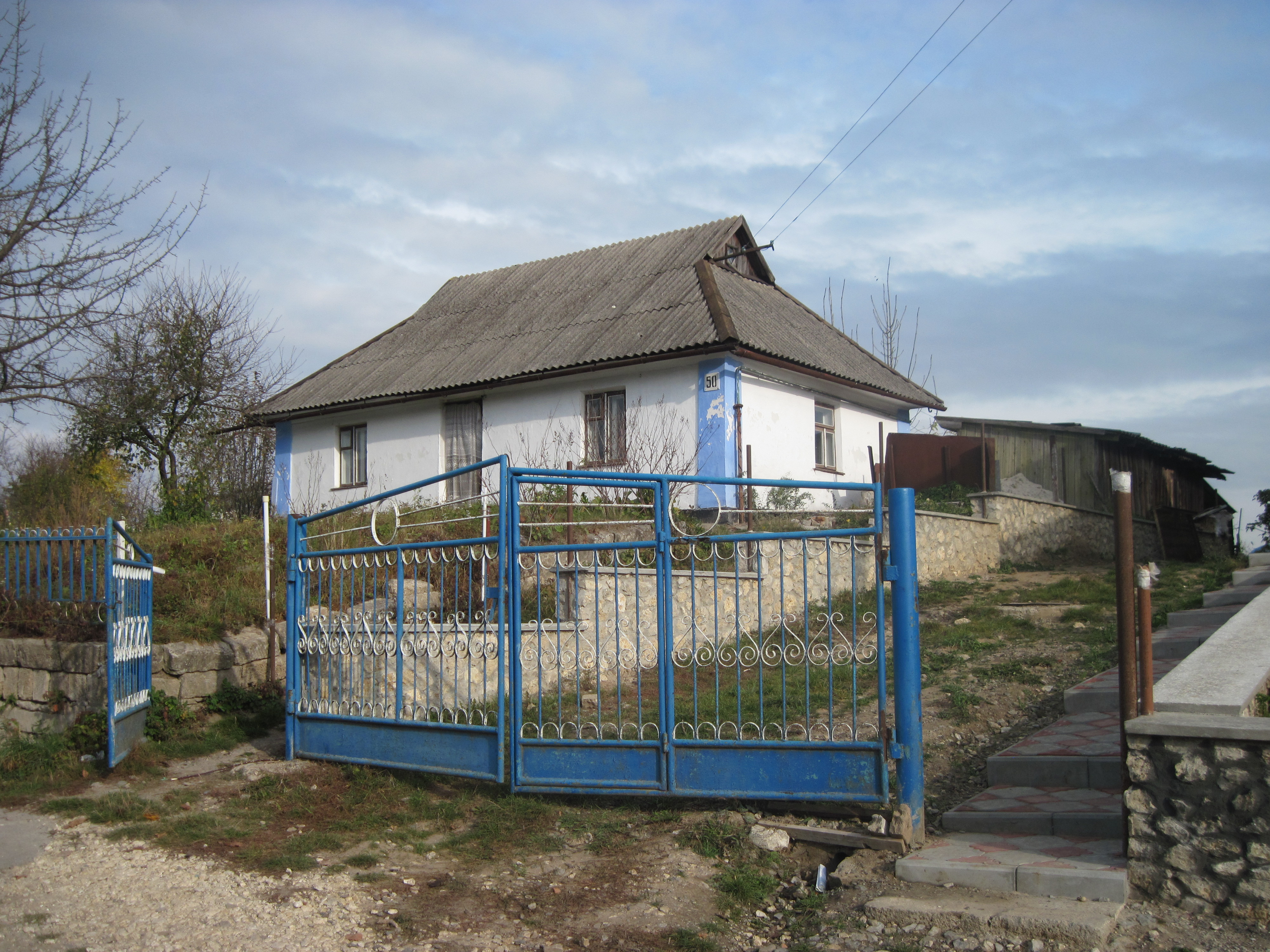 Стара хата, Збараж, осінь 2014